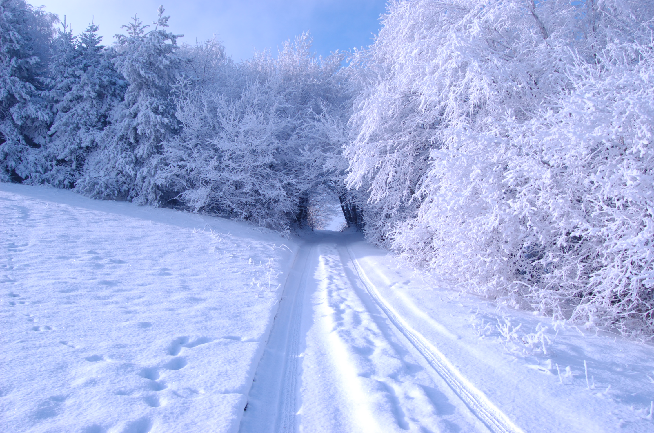 Taken near Nova vas on Polževo planetau in winter 2007